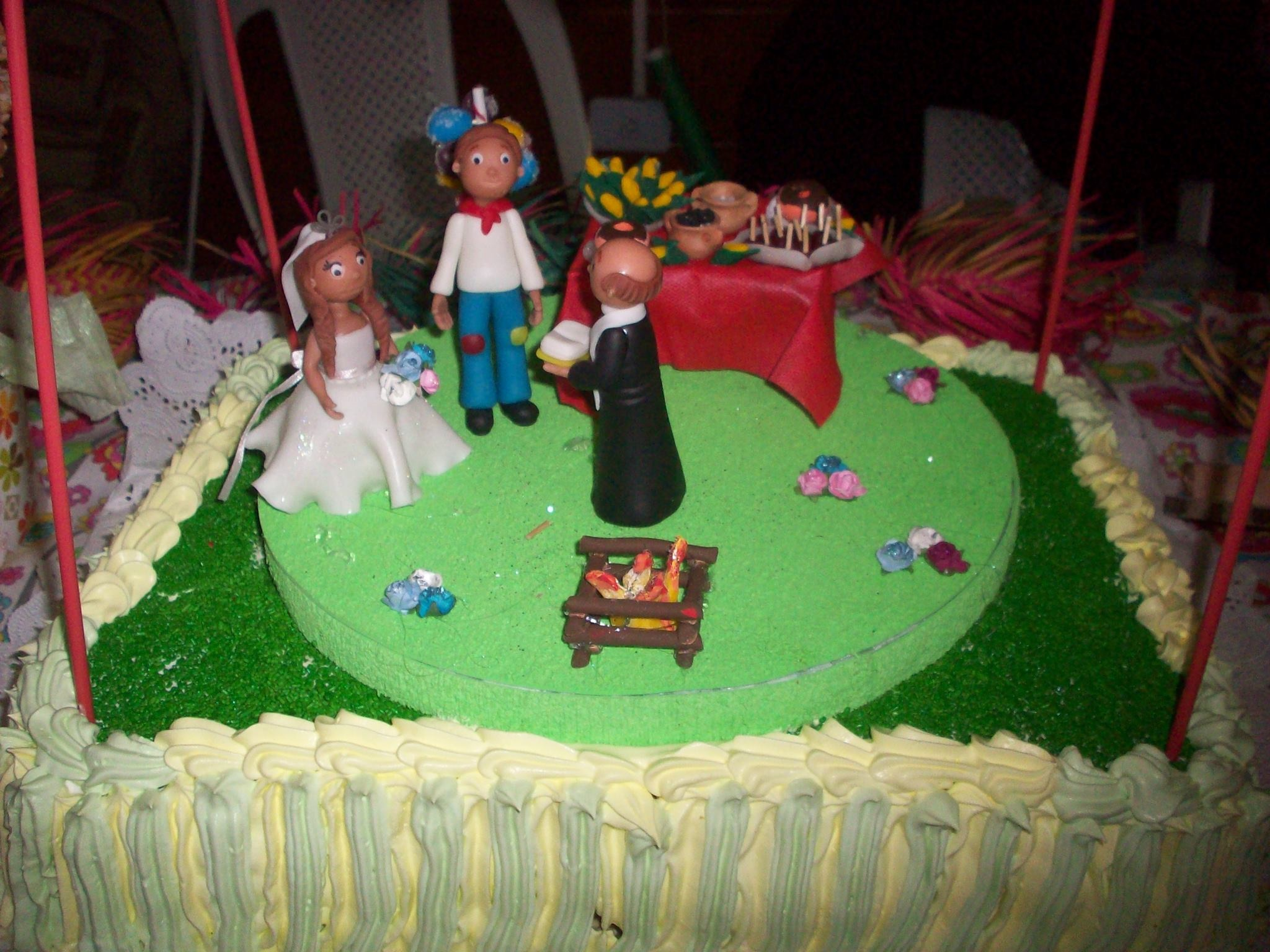 Torta de Casamiento para la Festa Junina